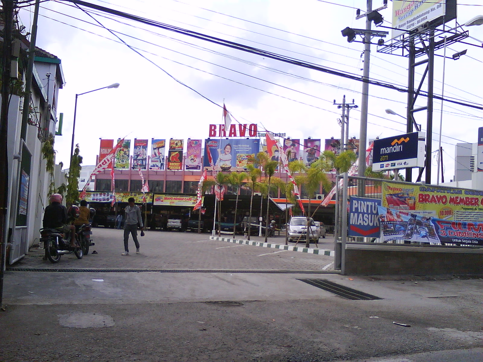 Bravo Mall Cepu